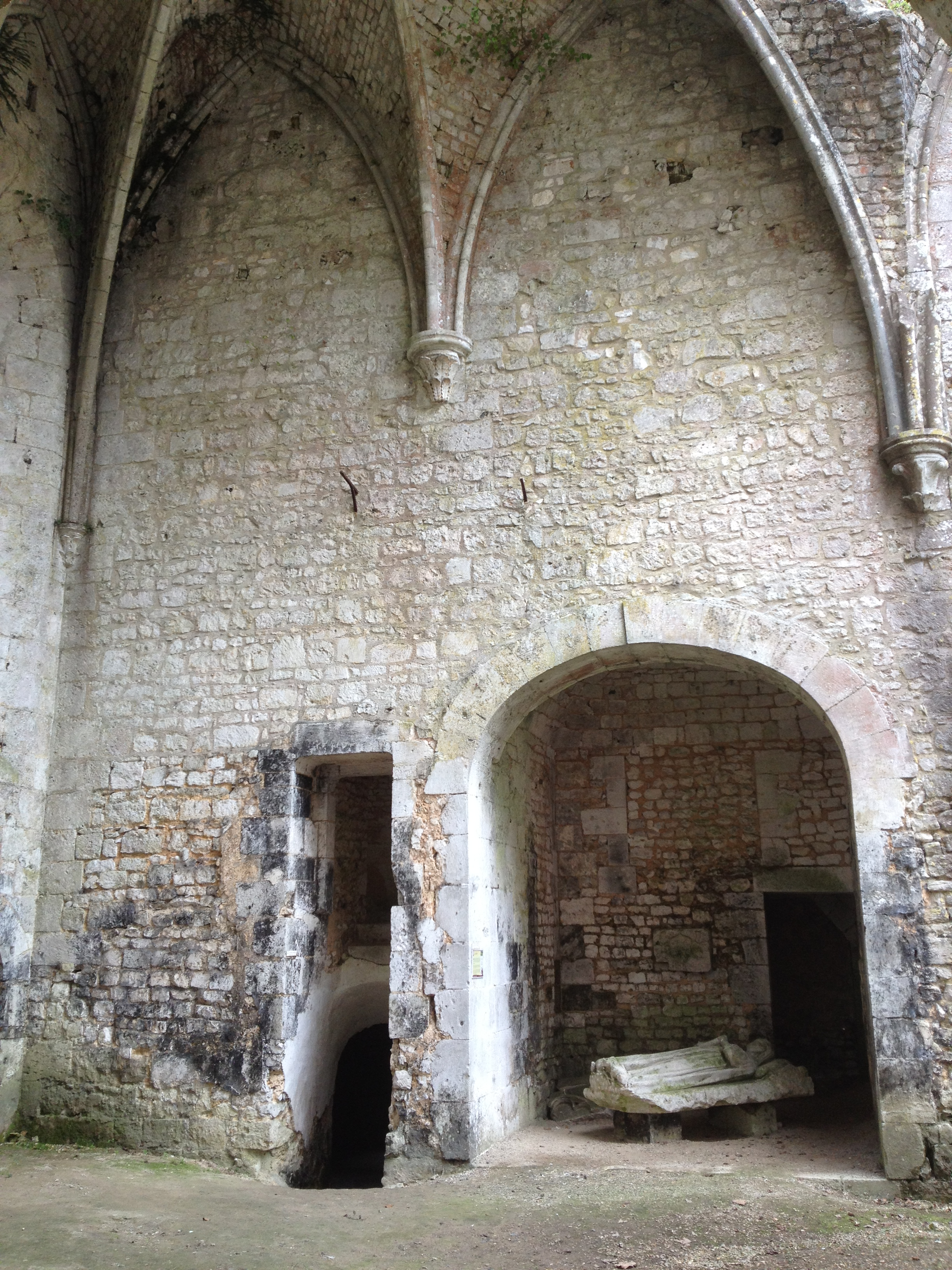 Chevet sud de l'abbatiale avec la chapelle contenant le gisant de Marie de Ferrières.